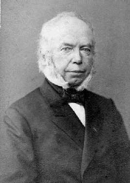 burgemeester van Boom